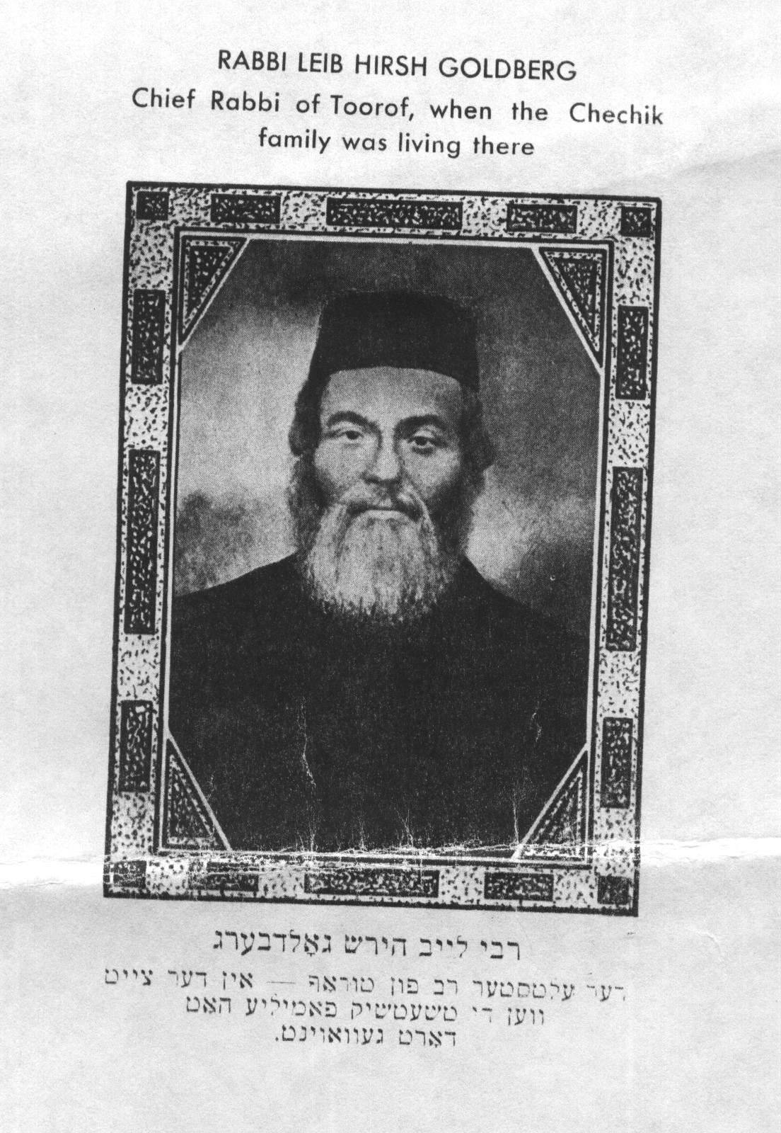 The last Turov Rabbi Leib Hirsh Goldberg before 1917.